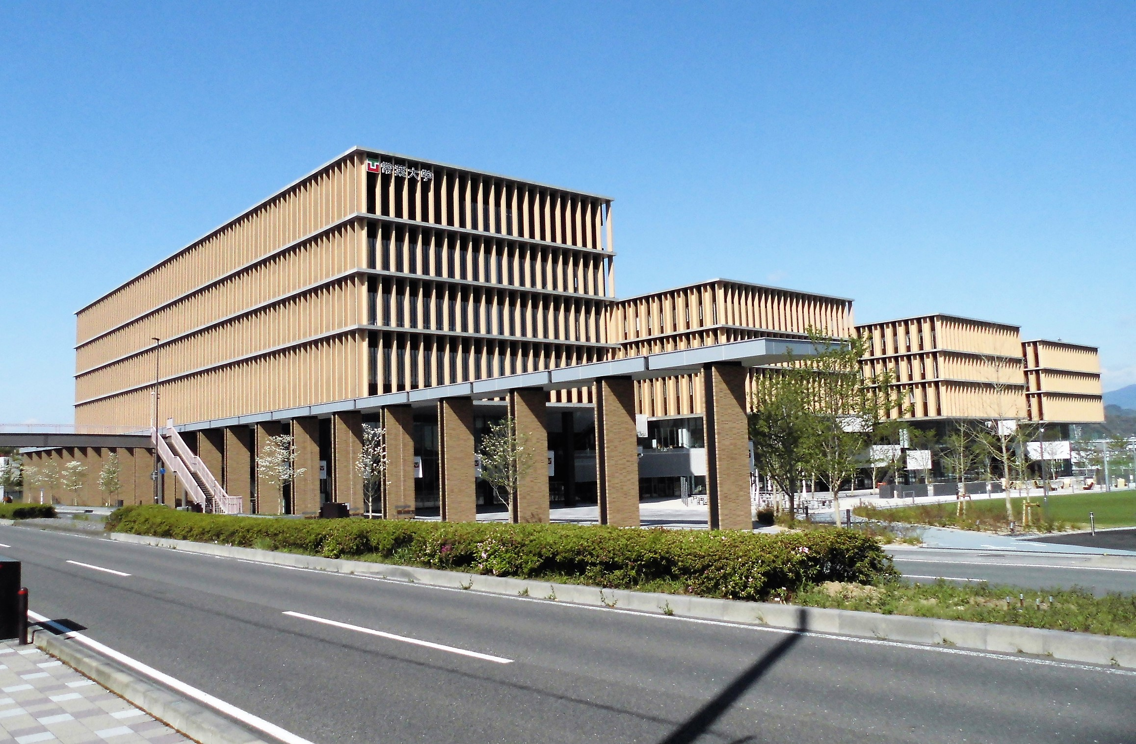 常葉大学静岡草薙キャンパス（静岡市駿河区弥生町）